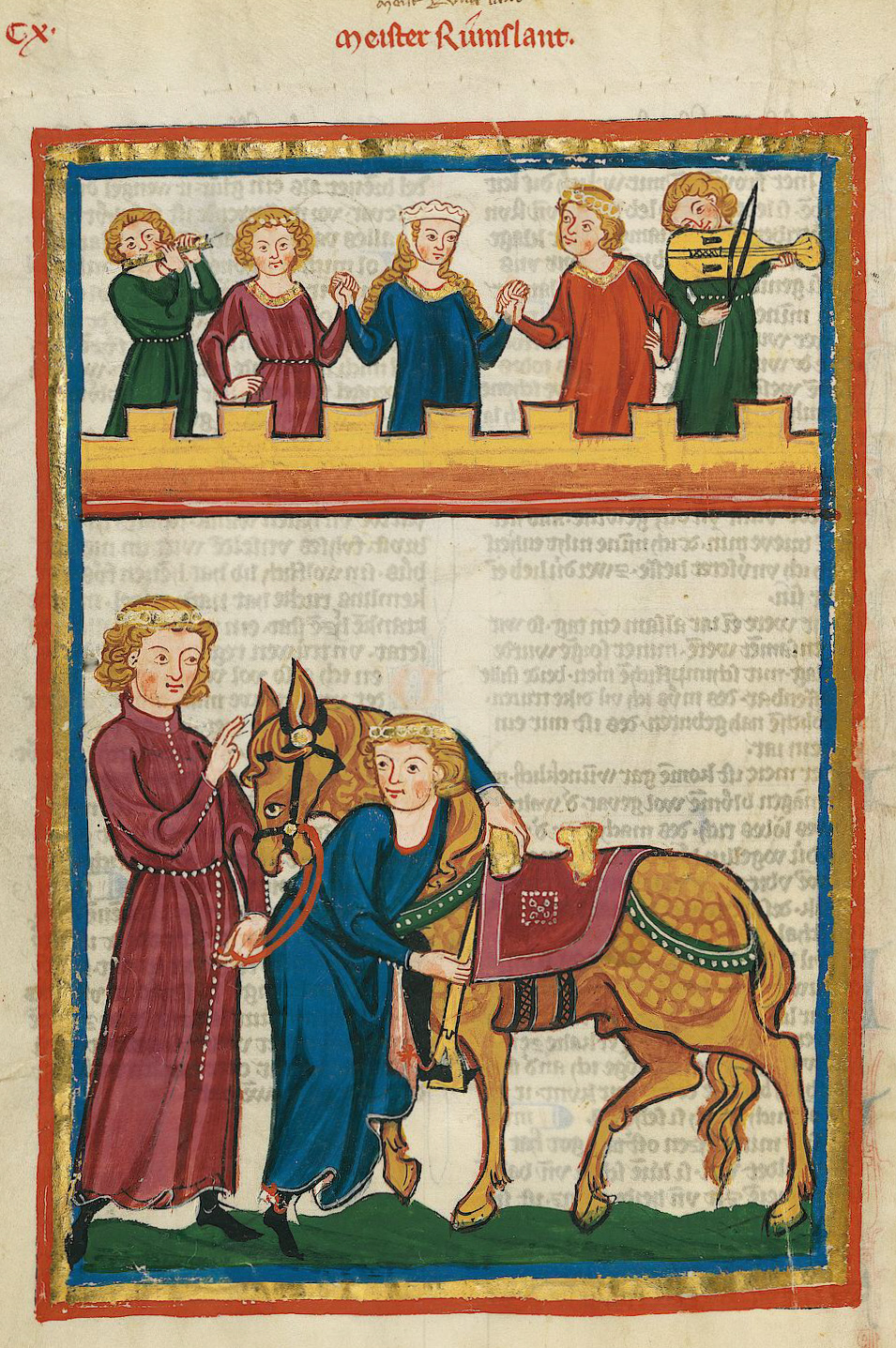 Codex Manesse, UB Heidelberg, Cod. Pal. germ. 848, fol. 413v: Meister Rumslant